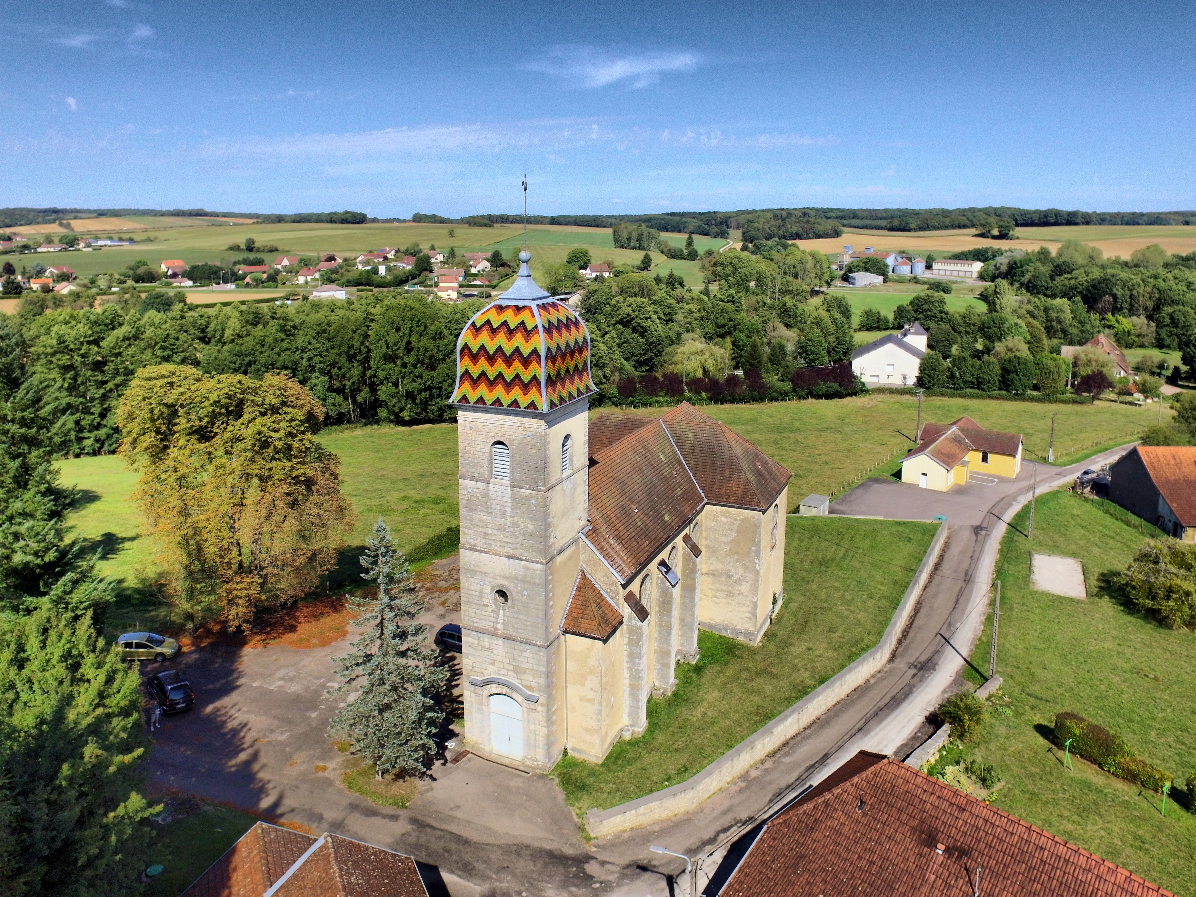 L'église de Guiseuil